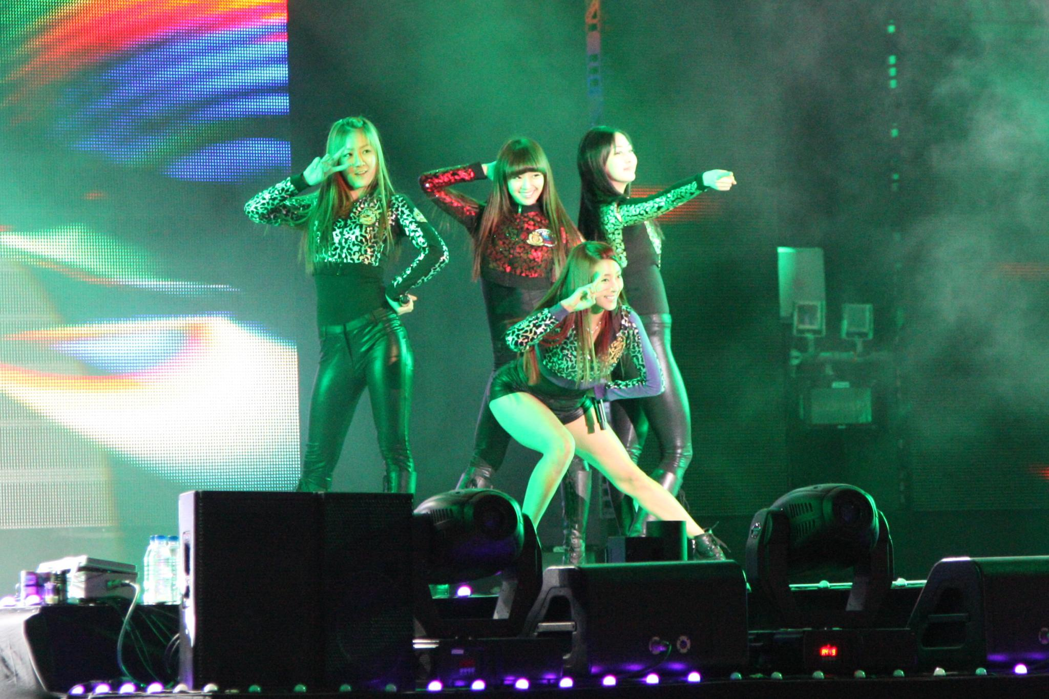 싸이월드 페스티벌_104